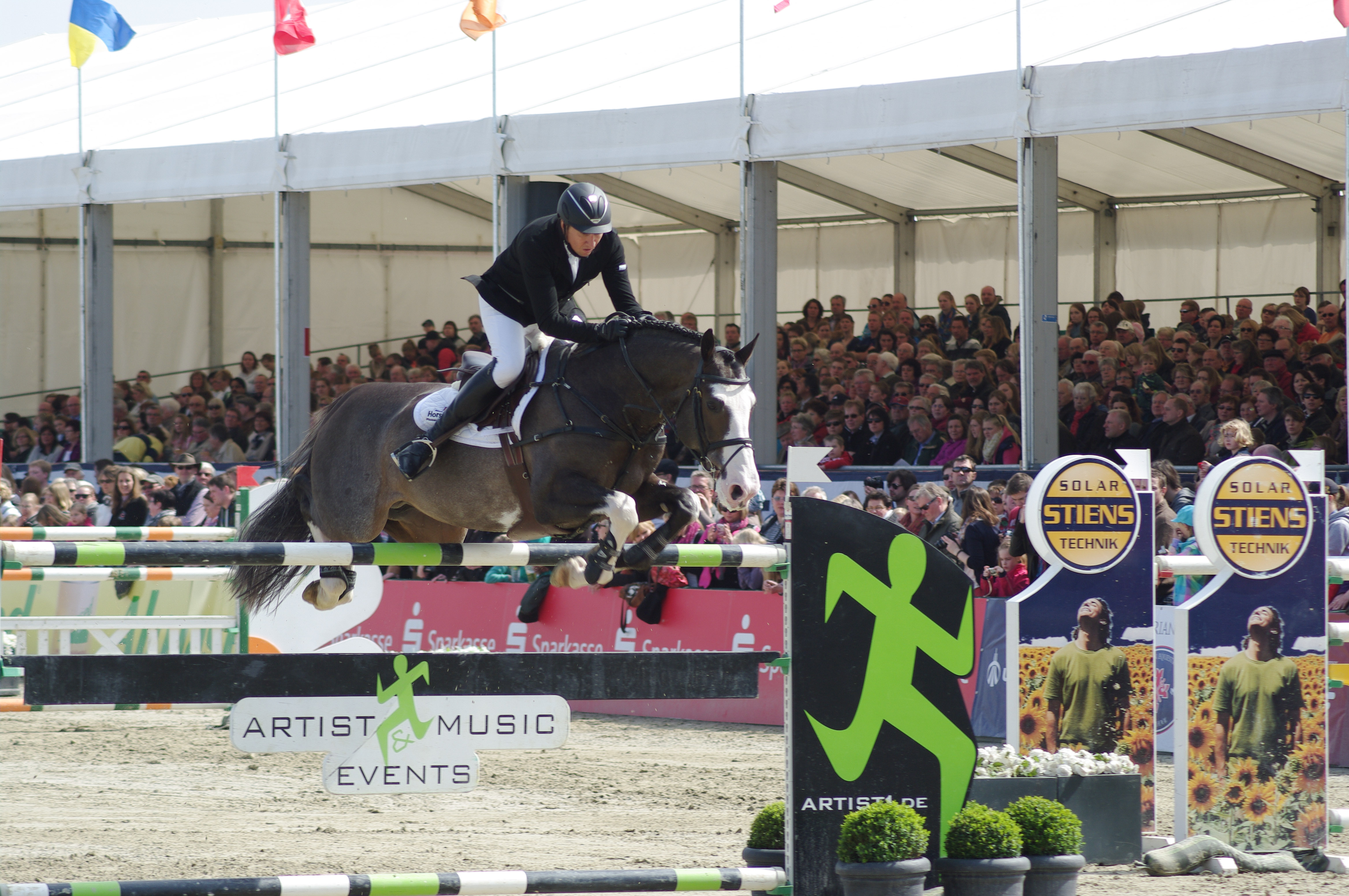 Horses & Dreams 2013: Jörg Naeve mit "JK Horsetrucks Commanchi - Google Maps - Google Earth